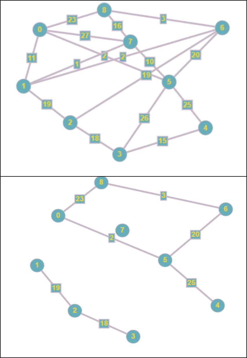 صورت مسئله و جواب آن